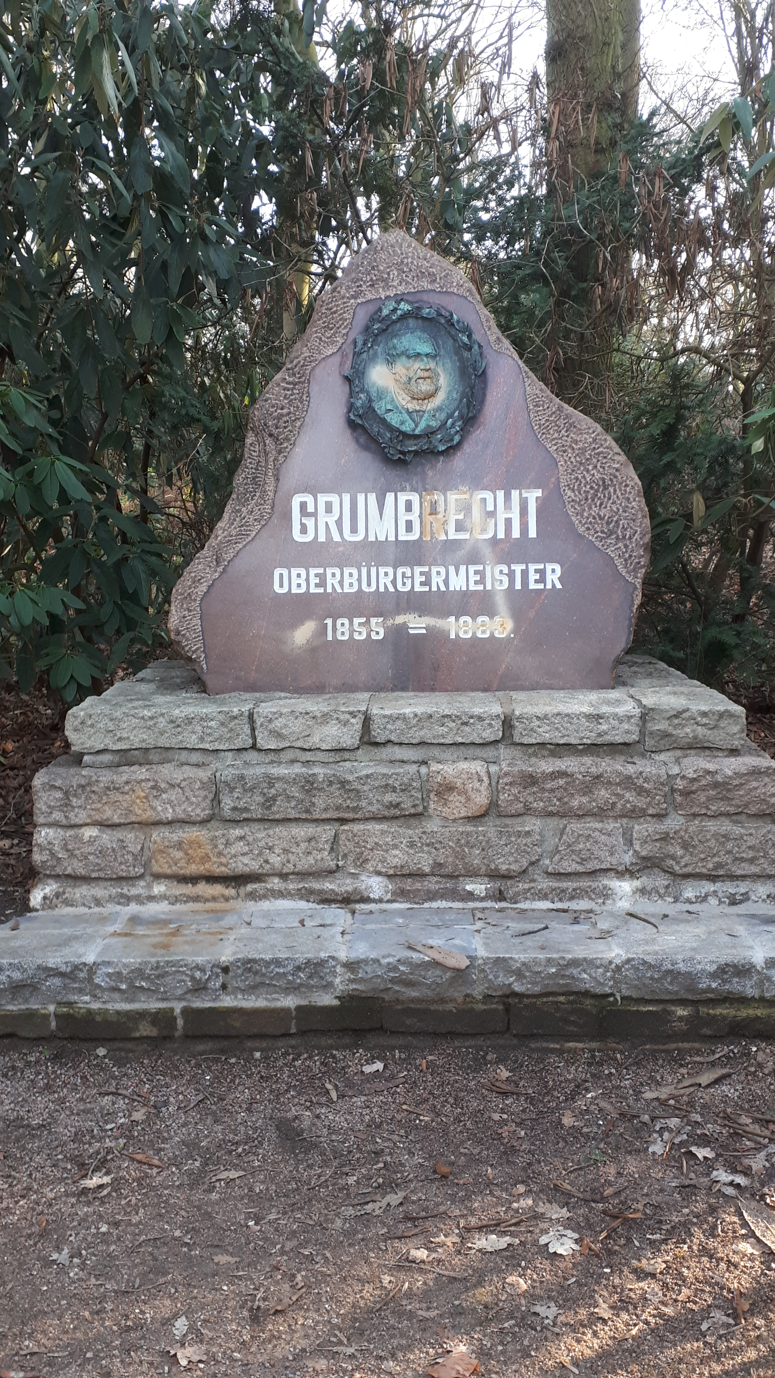 Kulturdenkmal in Hamburg-Harburg